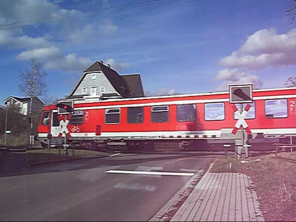 Vogelsbergbahn Bahnübergang Wartenberg-Angersbach (Bild aus Videoclip)